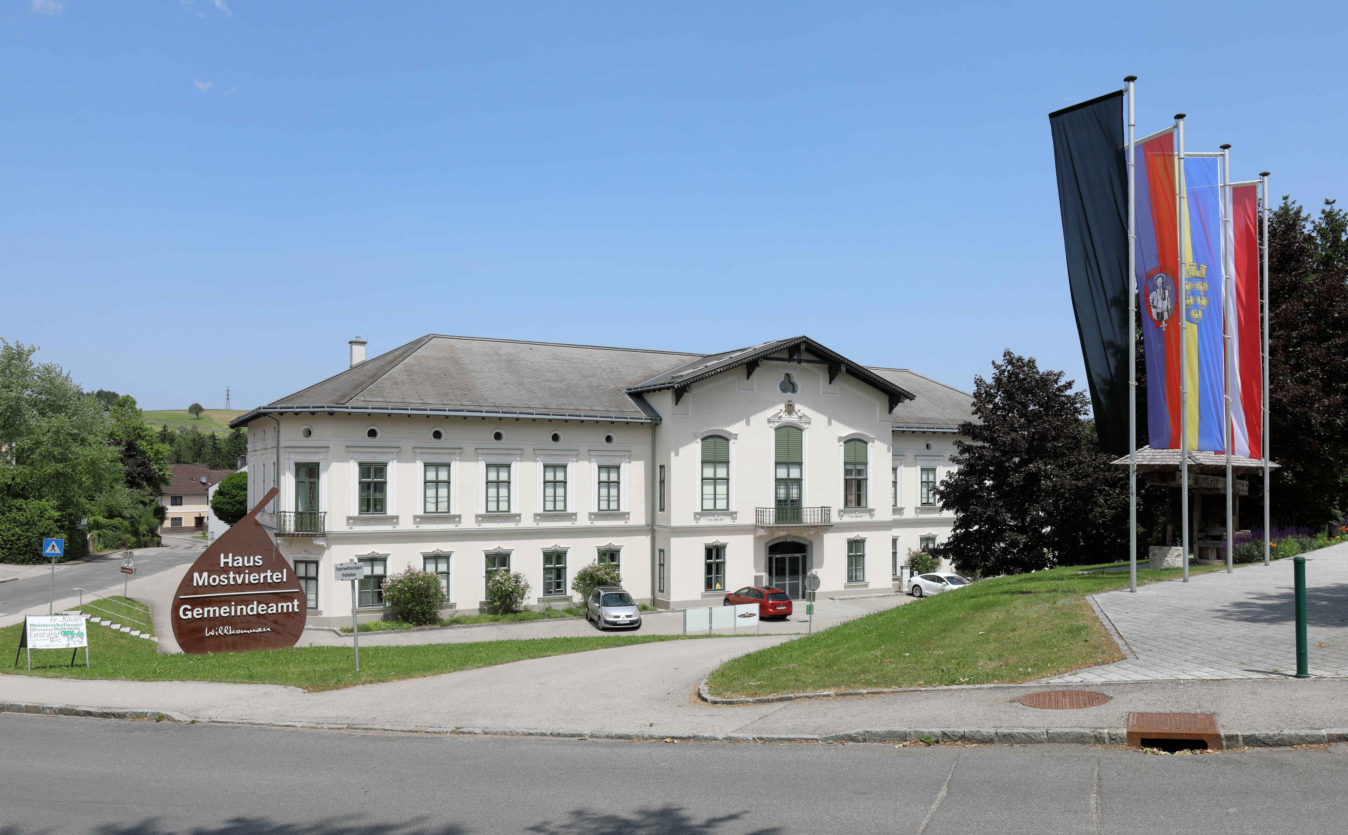 Gemeindeamt in Öhling, ein Ortsteil der niederösterreichischen Marktgemeinde Oed-Oehling.Ursprünglich war das Gebäude der Süd- bzw. Wohntrakt eines Vierkant-Meierhofes, der ab 1903 zur Pflegeanstalt Mauer-Öhling gehörte.